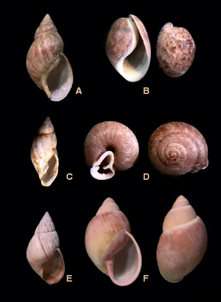 Fotos de Moluscos del Estado Falcón - Venezuela A. Achatina fulica B. Bulla striata C. Eudolichotis distorta D. Labyrinthus umbrus E: Orthalicus maracaibensis F, Strophocheilus oblongus